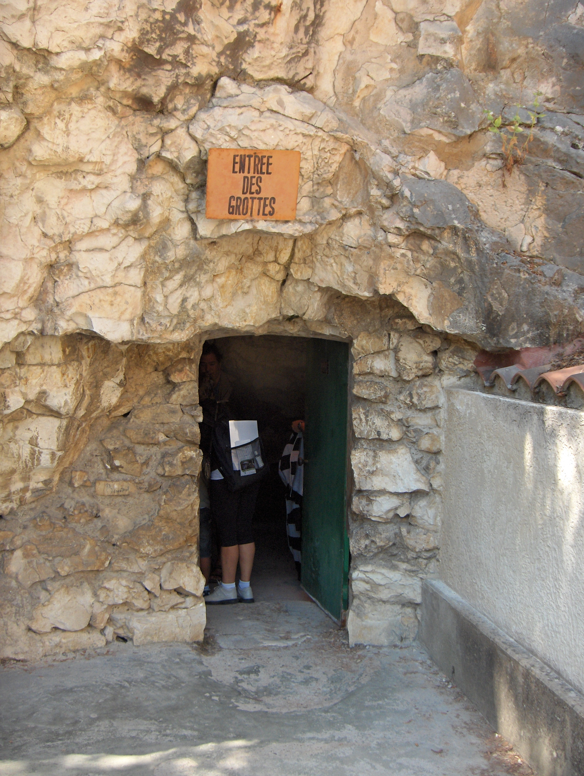 Ingang tot de Grotten van Thouzon